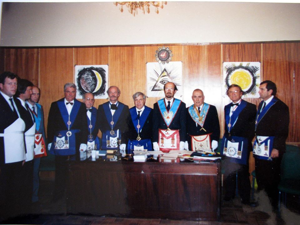 Первые работы ДЛ Гармония (7.9.2017)